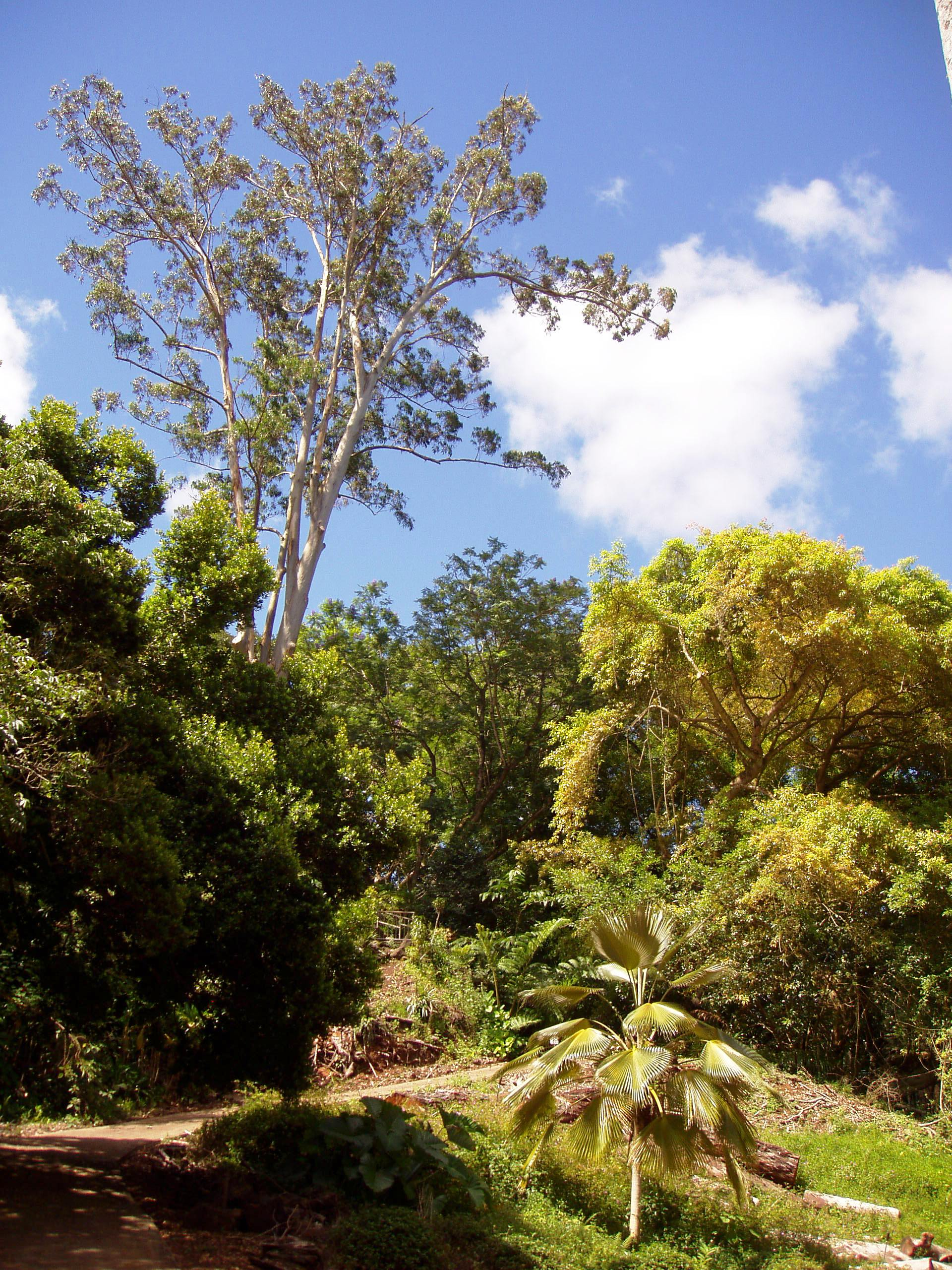 Wahiawa Botanical Garden, Oahu, Hawaii, USA. General view.